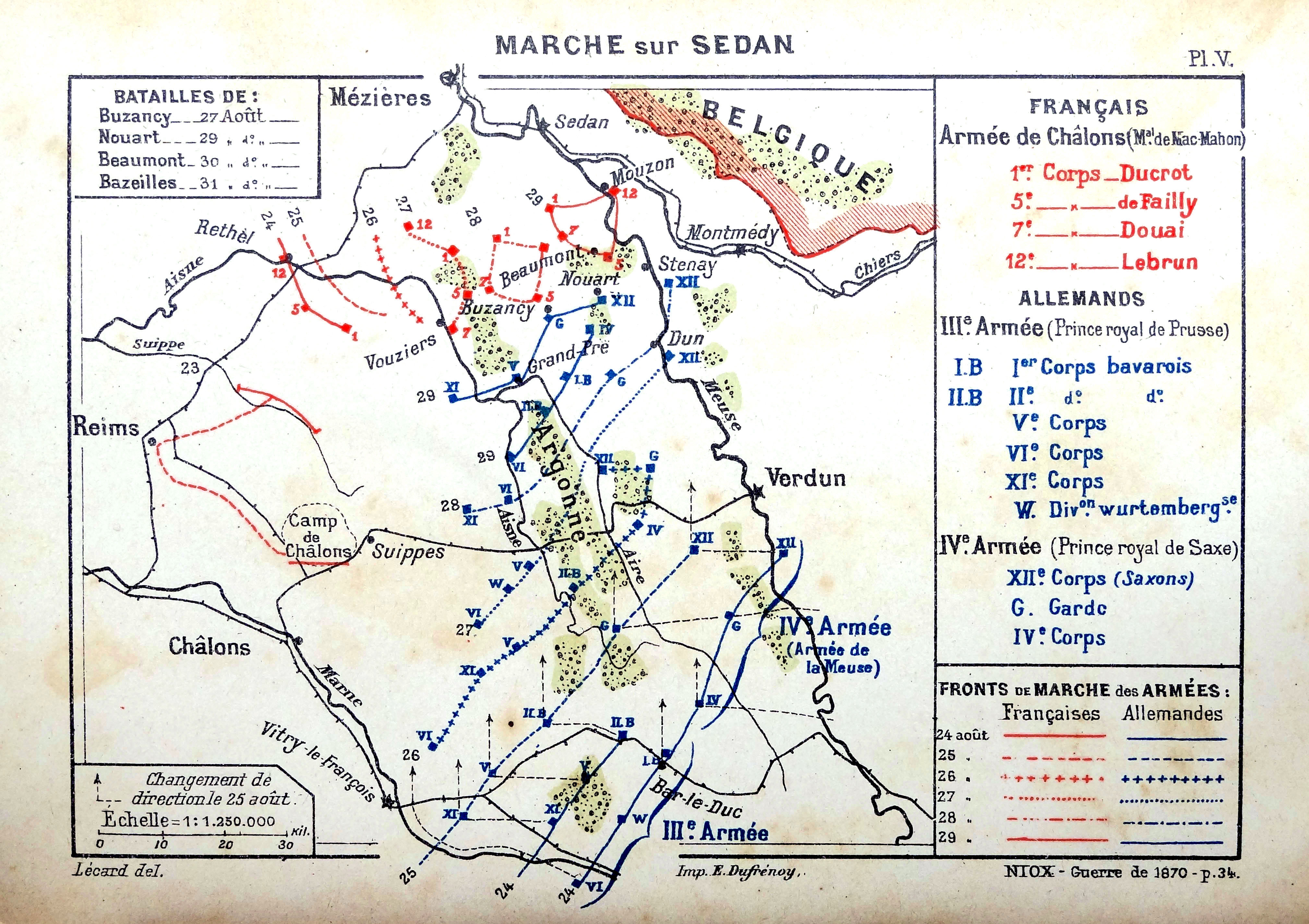 Carte des déplacement de l'armée de Châlons du 23 au 29 août 1870. Cette carte fut publiée dans l'ouvrage du général Niox, La guerre de 1870 - Simple récit, publiée en 1898 par la librairie Ch. Delagrave. Ces mouvements précèdent la bataille de Sedan qui se déroula le 1er septembre 1870.